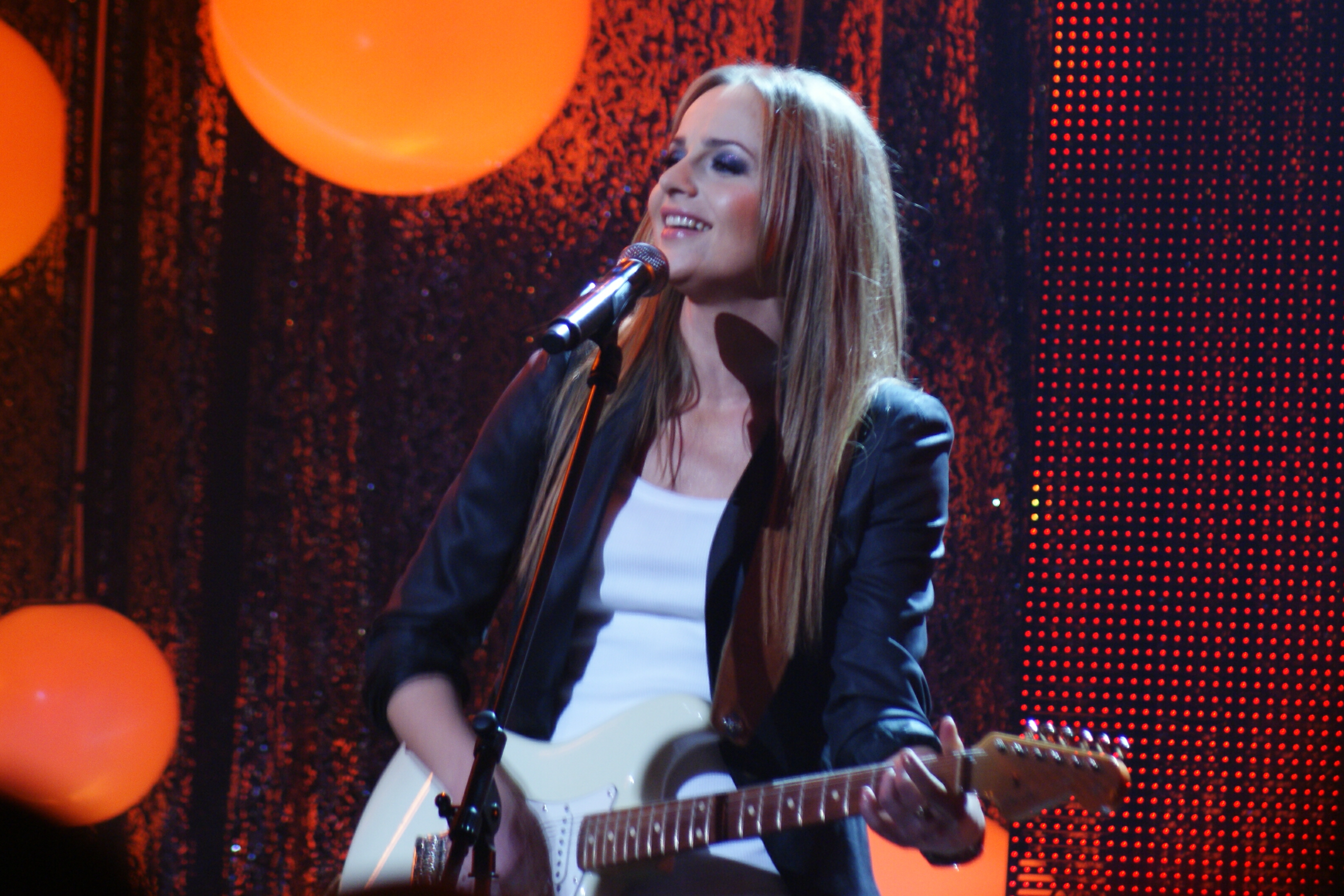 Magdalena Wójcik podczas Krajowych Eliminacji Eurowizja 2011